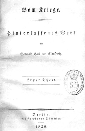 Title page of Clausewitz's Vom Kriege